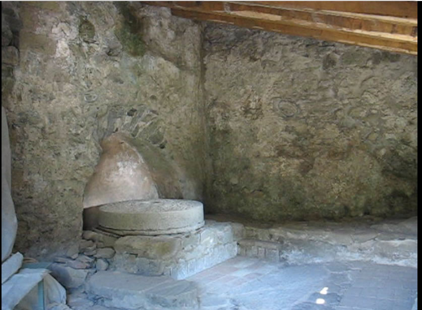 Vista de l'interior del molí fariner de Can Marquès a Pineda de Mar, Maresme, Catalunya.